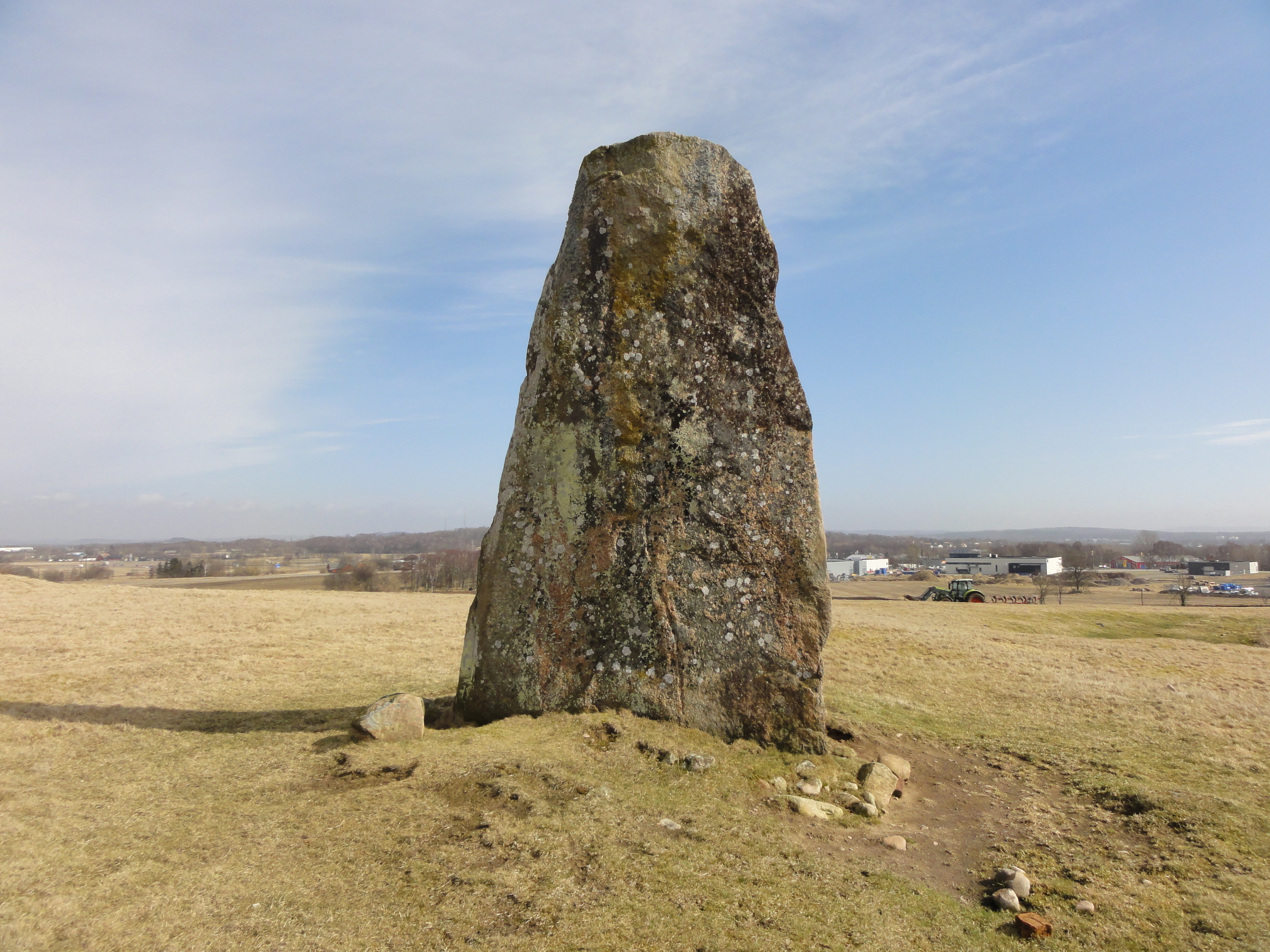 Stomma kulle, nära Stafsinge kyrka